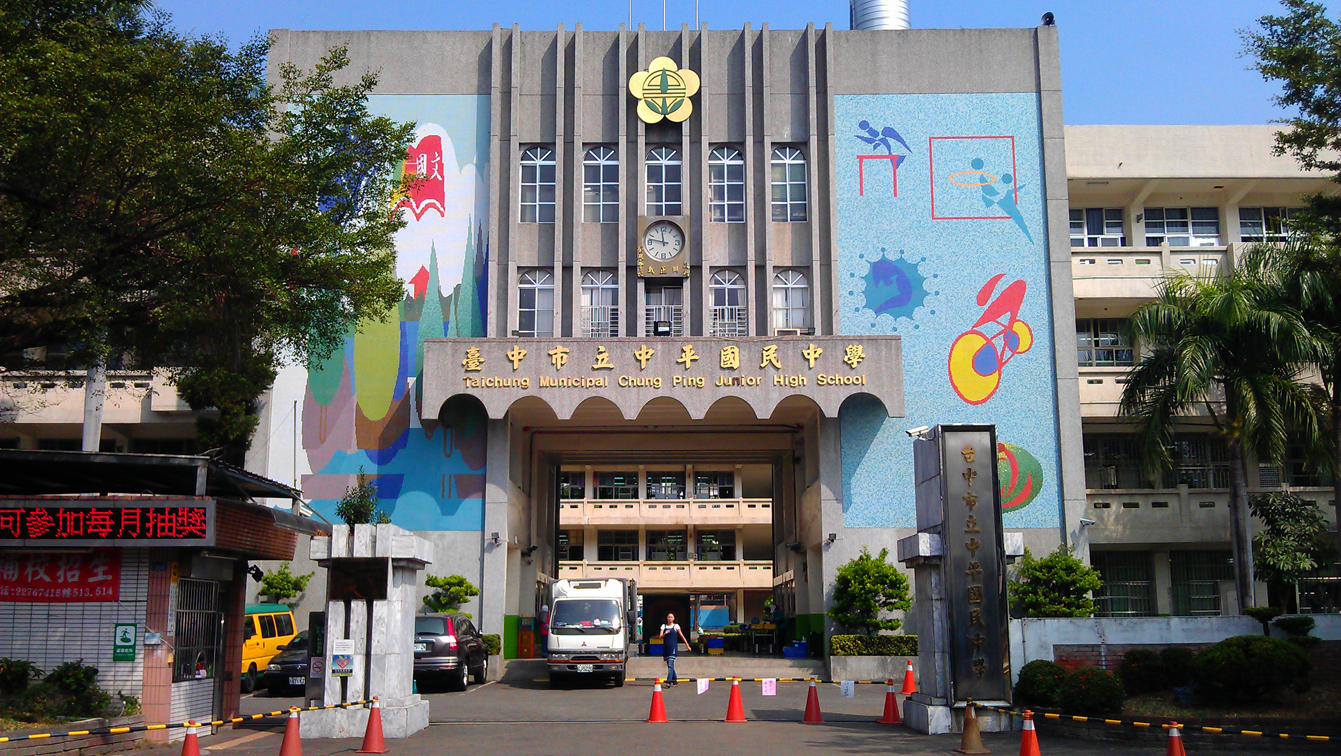 台中市中平國中